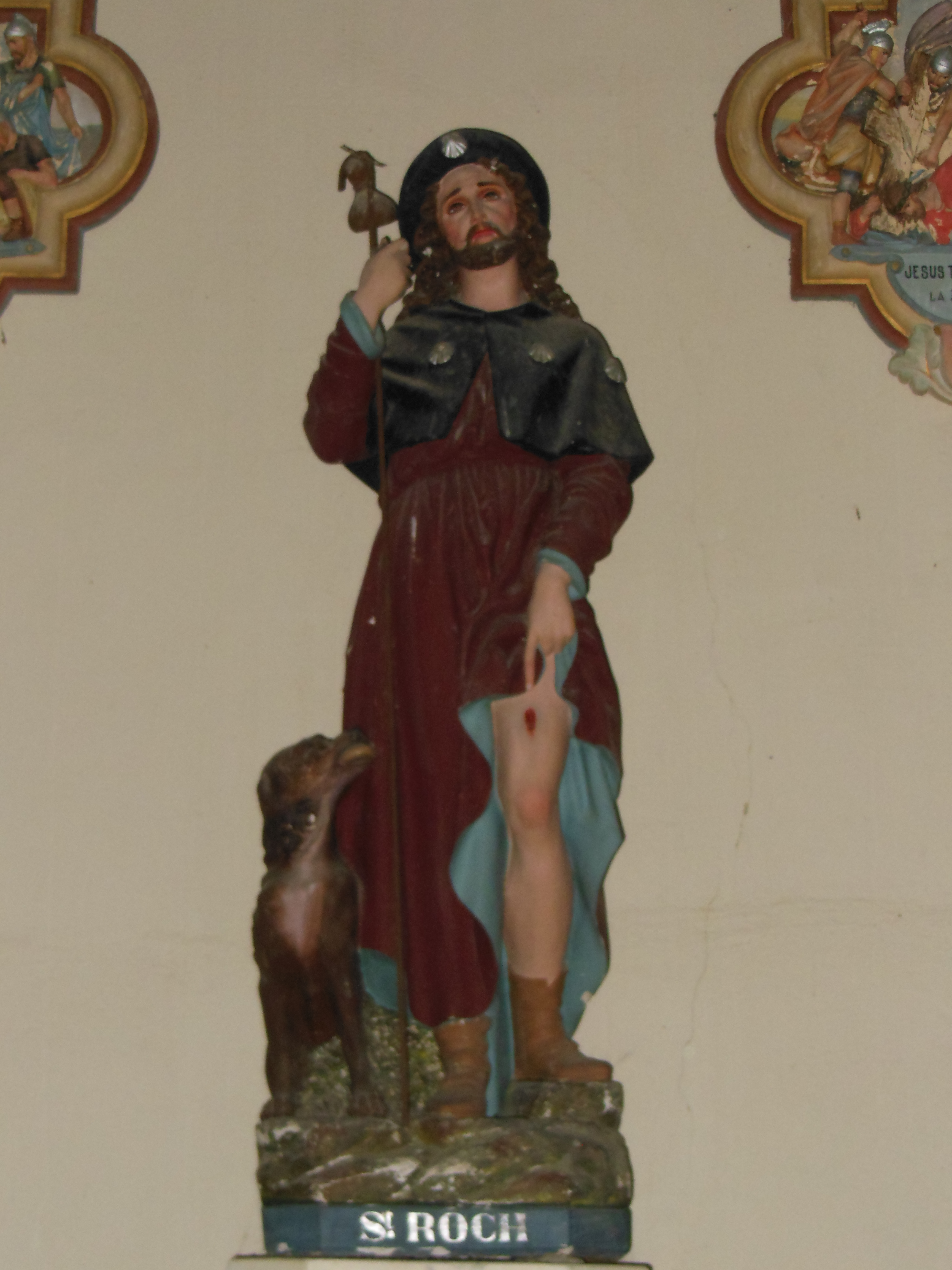 Église Saint-Loup de Lacrabe (Landes, France), statue de saint Roch